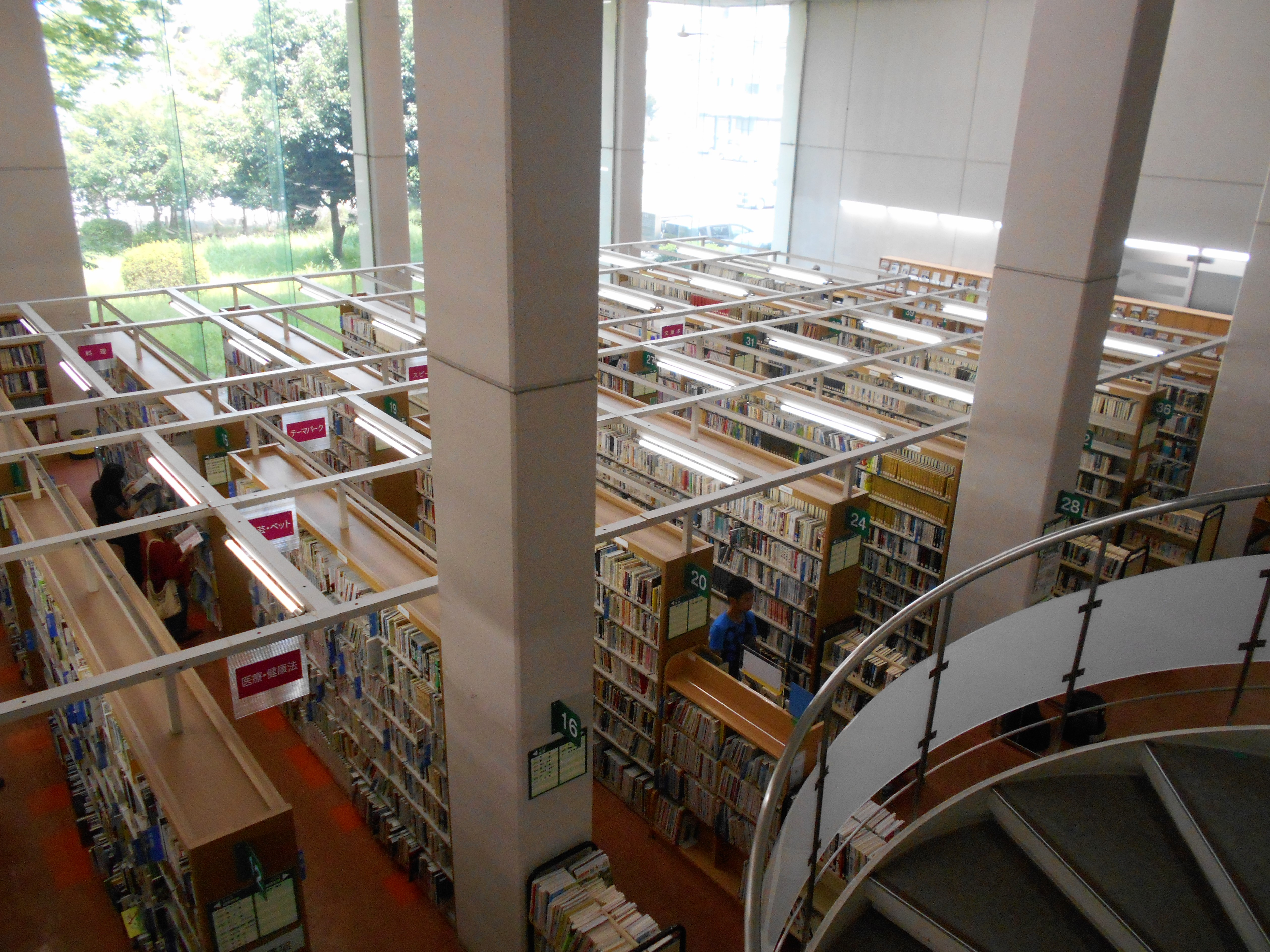 四日市市立図書館。階段から1階を見る。